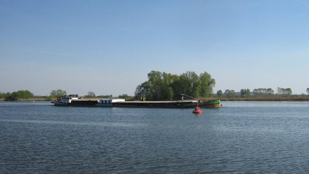 Die Havel kurz hinter der Einmündung von Havelkanal und Sacrow-Paretzer-Kanal (Brandenburg).